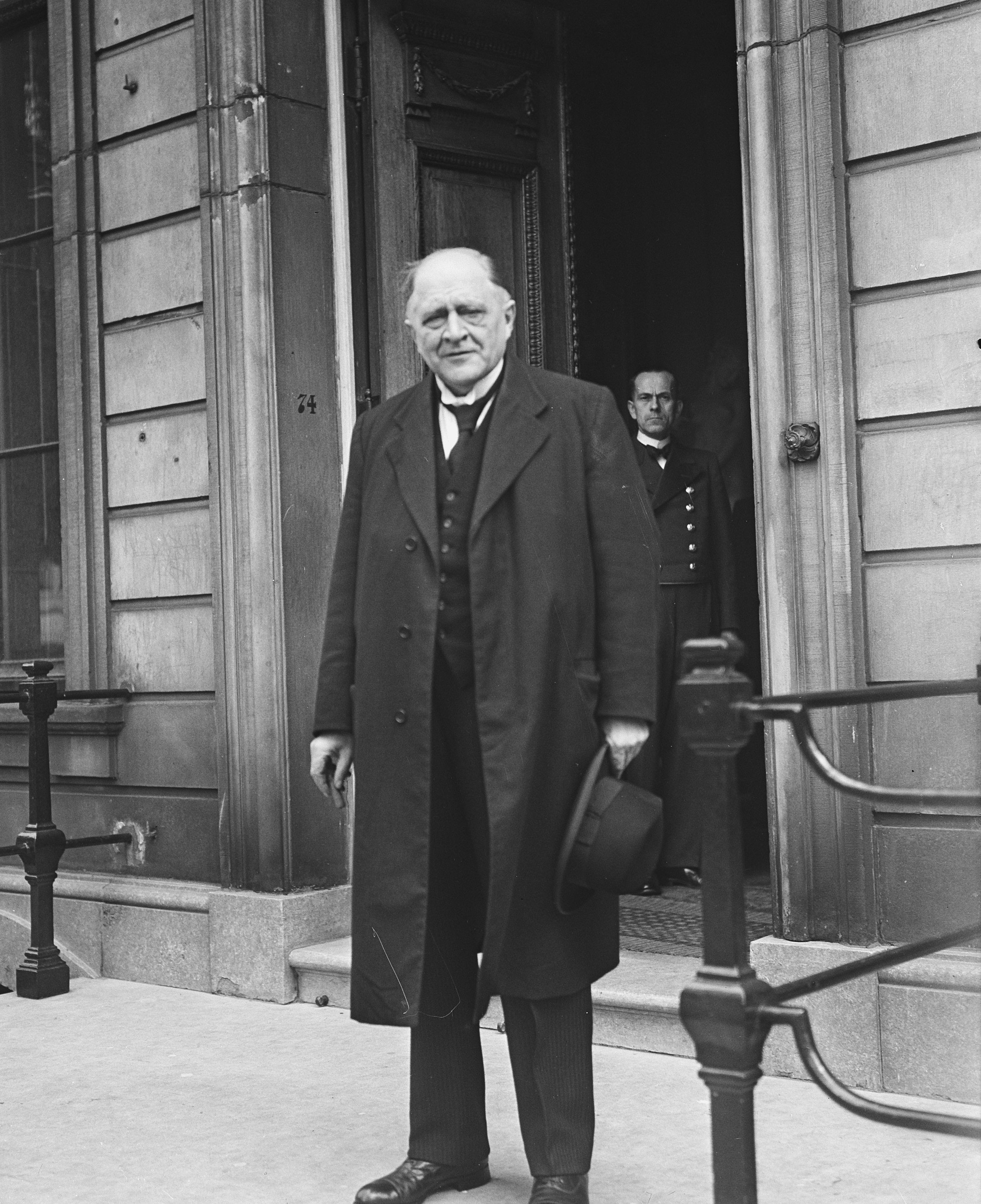 De Koningin ontvangt op de Lange Voorhout in Den Haag ds. Pieter Zandt van de SGP, Nederland 20 mei 1955.